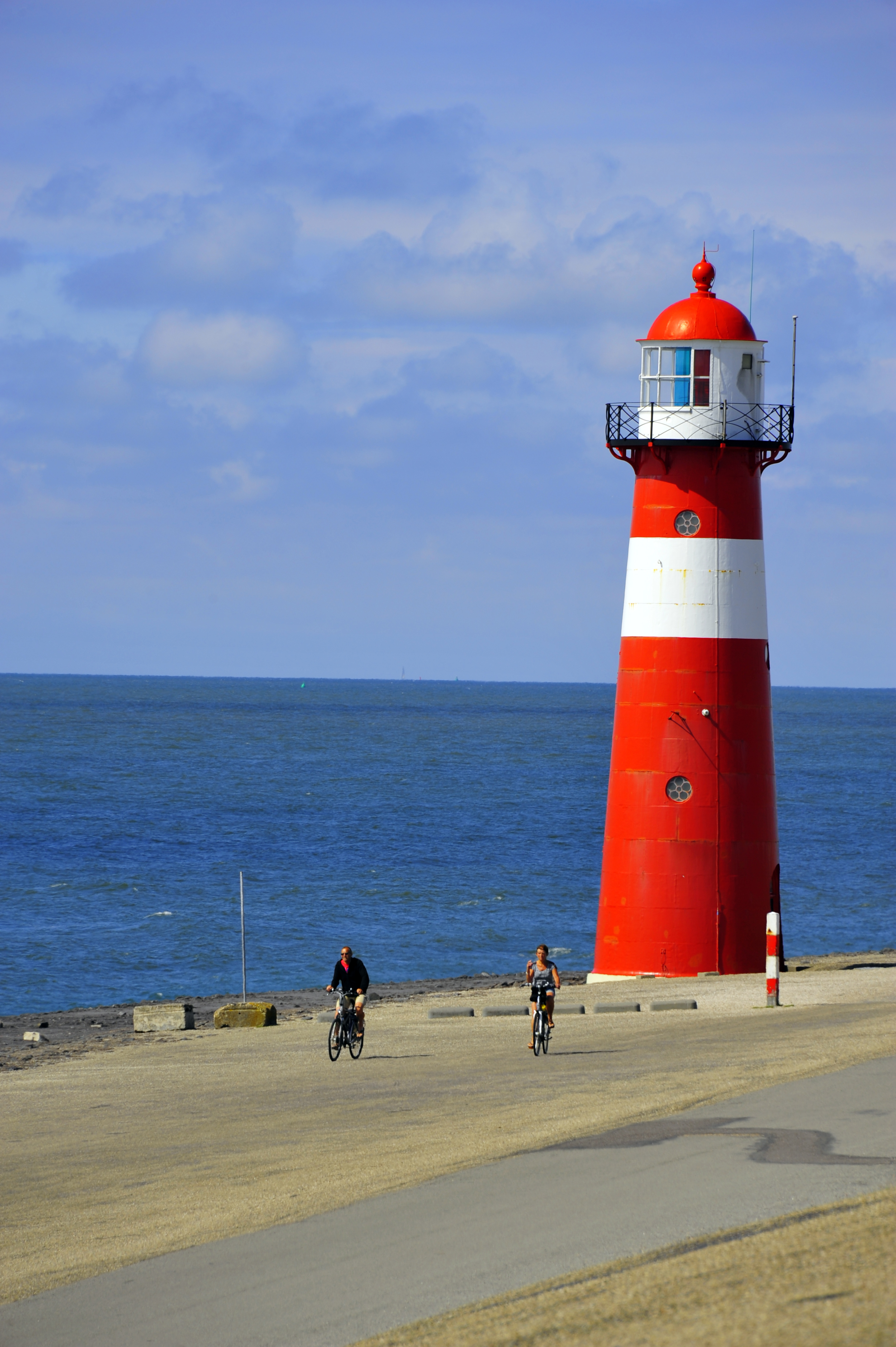 Vuurtoren Westkapelle Laag